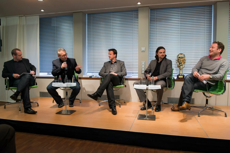 Tilmann Meuser (2. v.l.), Fredi Bobic (m.) und Lutz Pfannenstiel (2. v.r.) beim RUHRCUP 2012 - die anderen Personen arbeiten wohl nicht beim Uploader